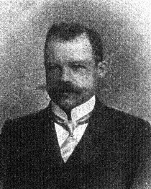 Österreichischer Politiker, Reichsratswahl 1907, Name siehe Dateiname